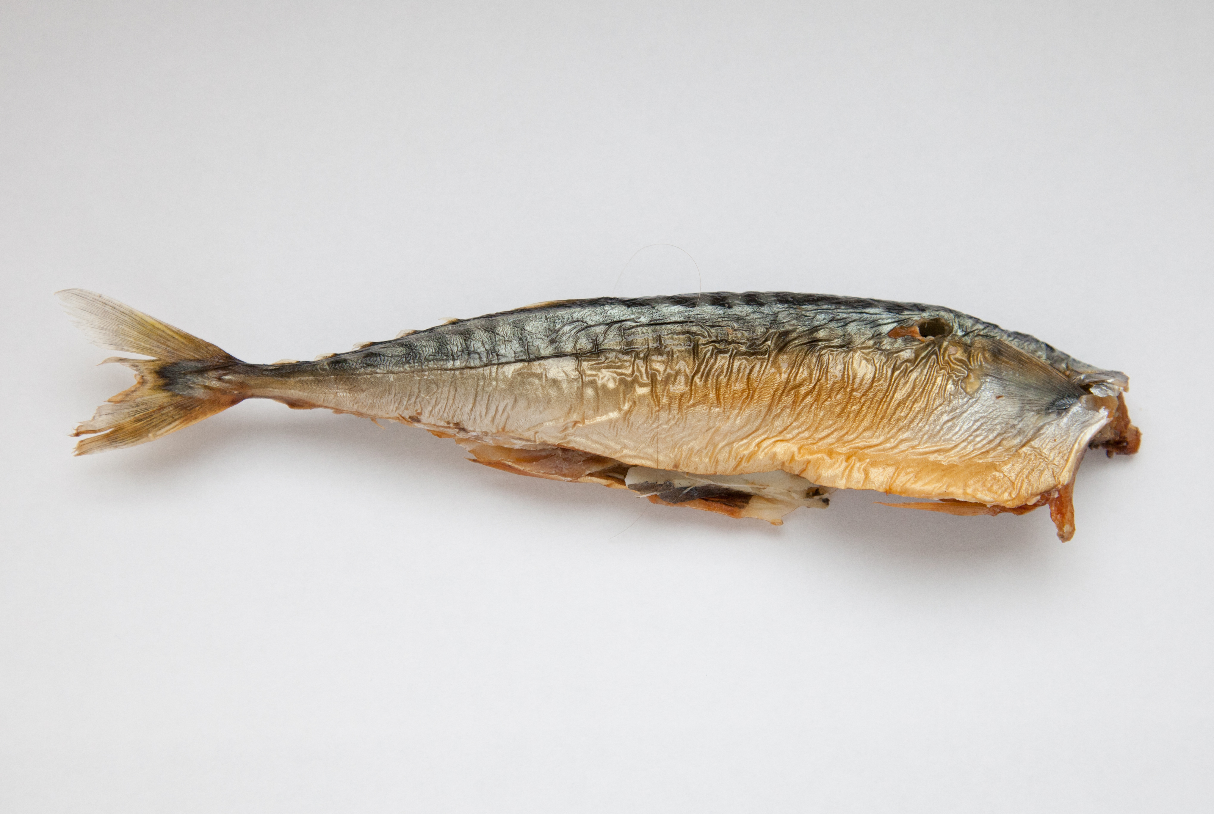 Makrele geräuchert